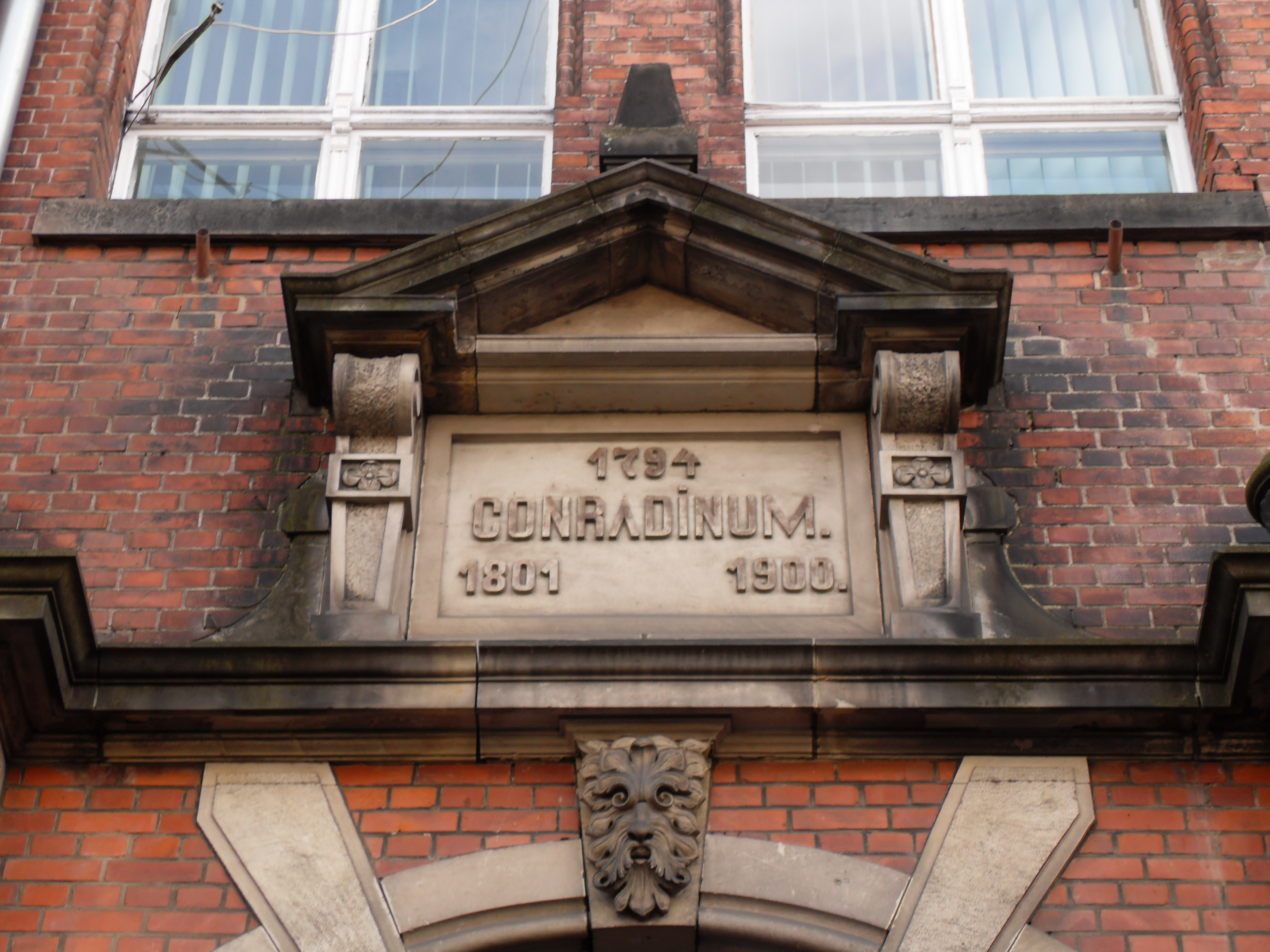 Gdańsk Wrzeszcz, szkoła Conradinum - zabytkowa tablica pamiątkowa nad wejściem głównym.